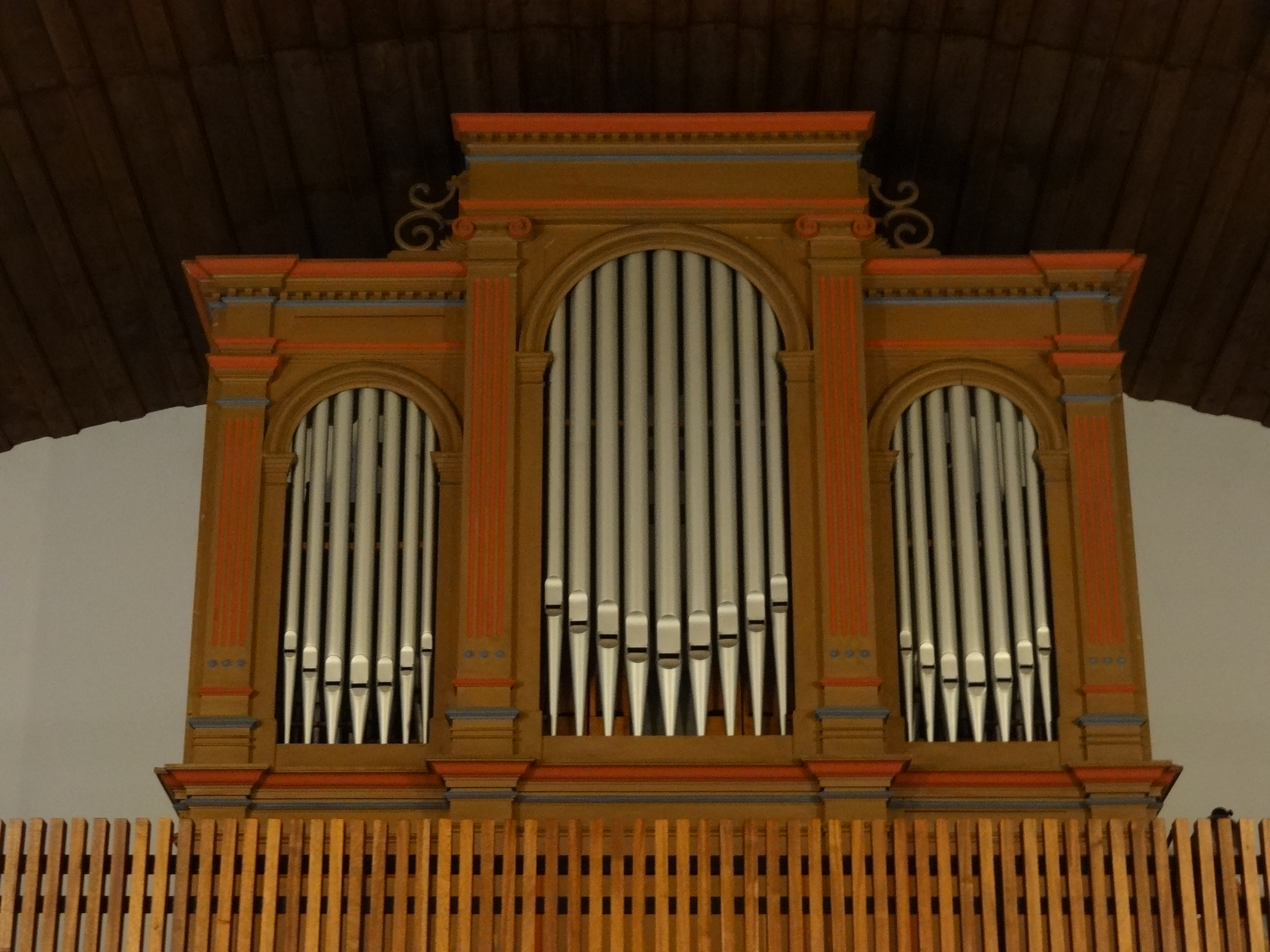 Evangelische Kirche (Hattenrod)Evangelische Kirche (Hattenrod)